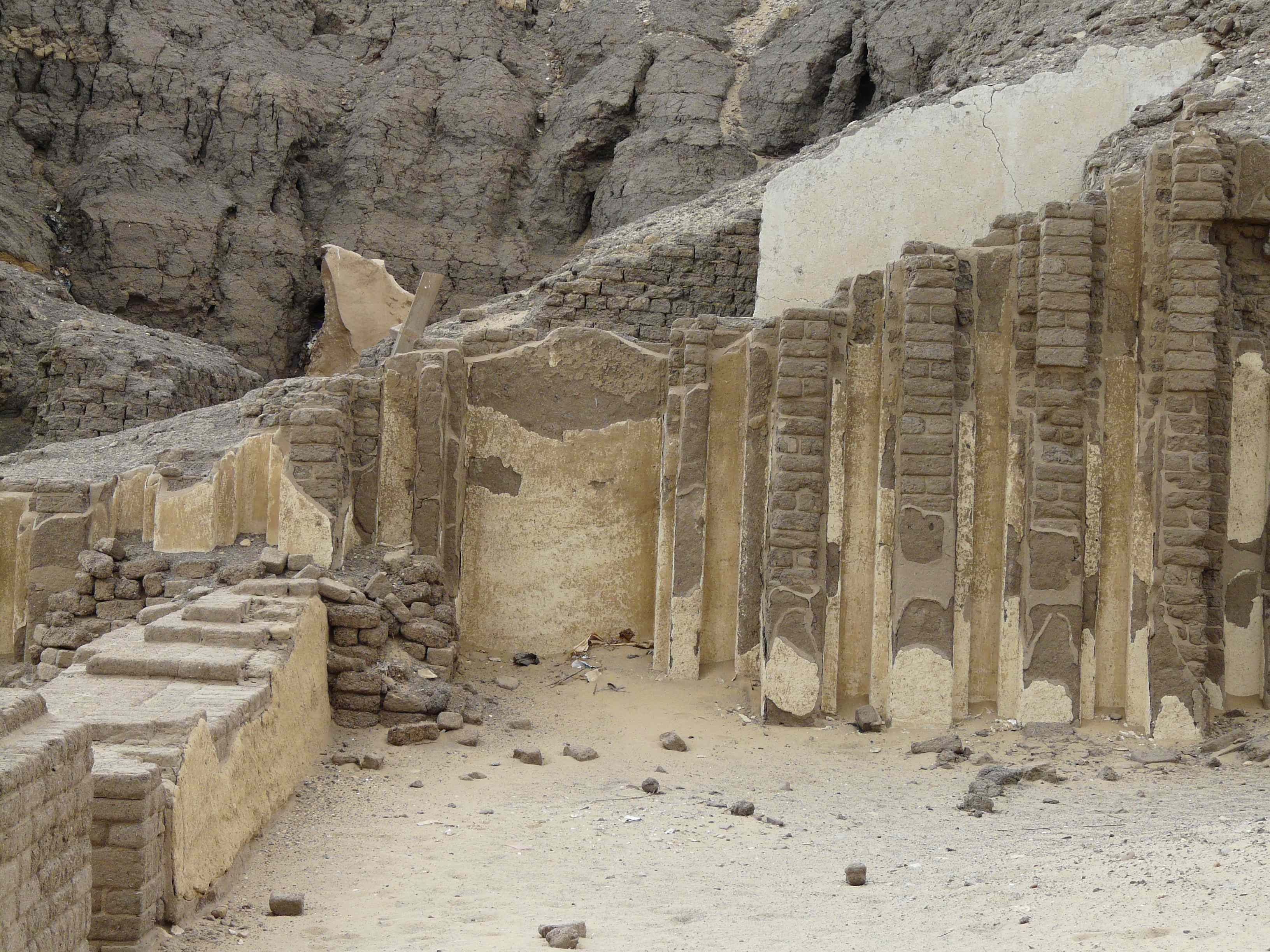 Meidoum - Façade du mastaba de Nefermâat (M16)